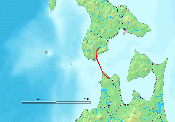 Seikantunnel /Tsusugaru street